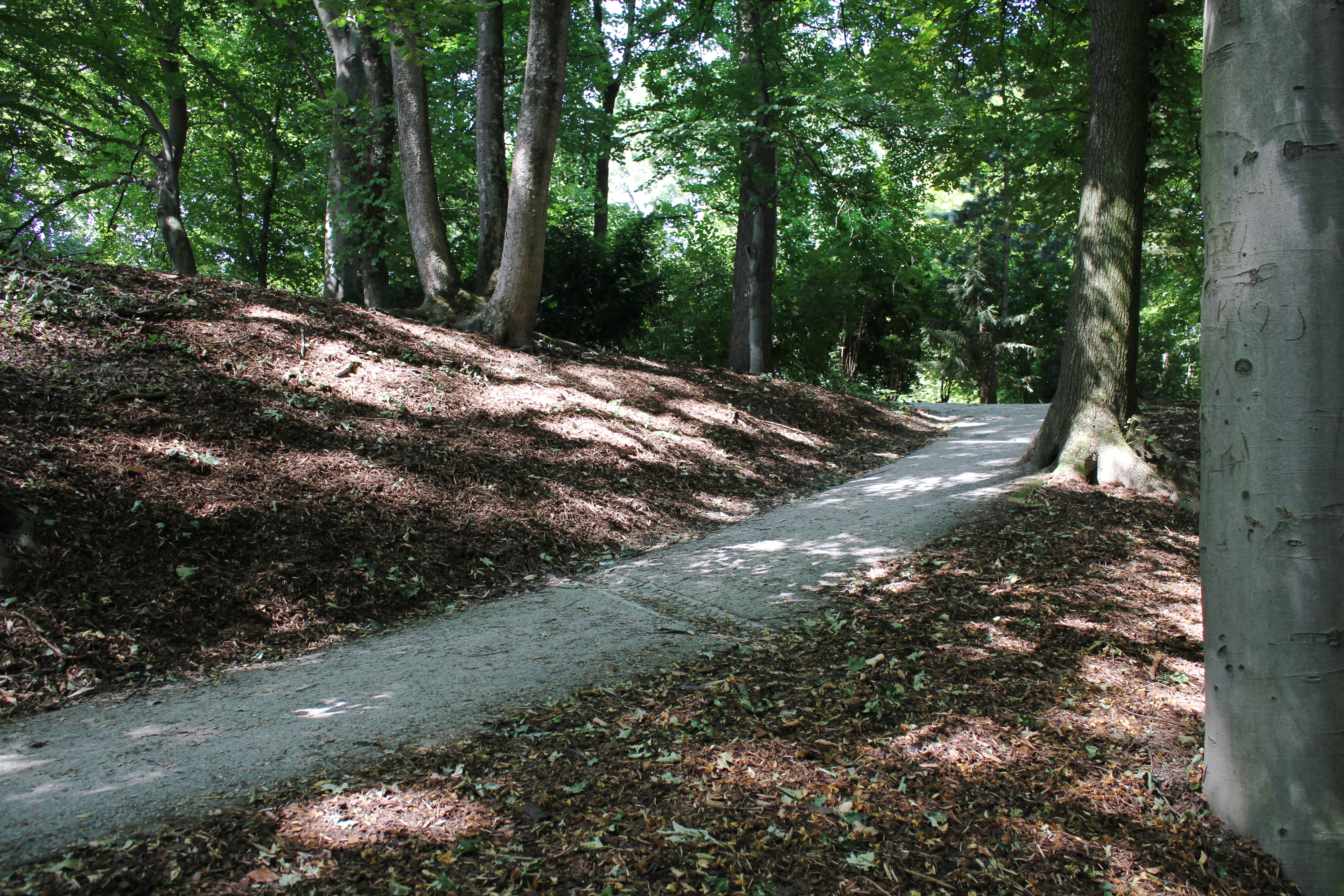 Finanzgarten, München, Germany